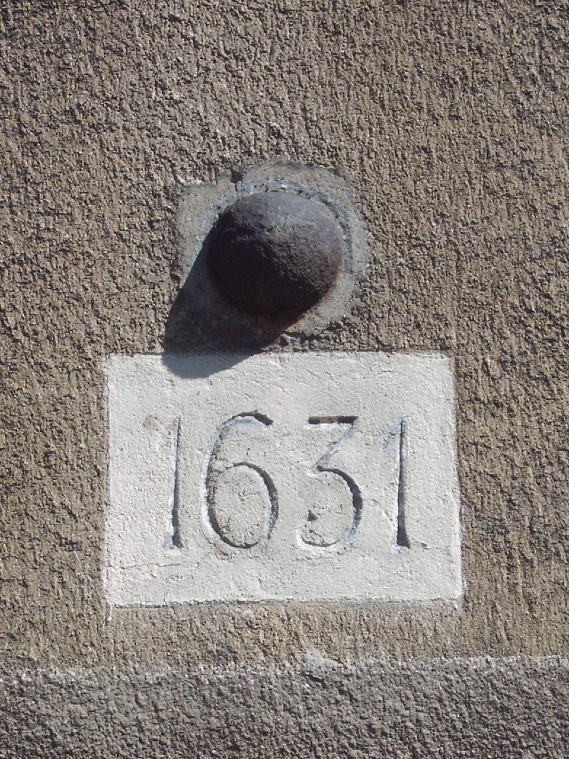 Kanonenkugel in der Fassade des Hauses Alt Westerhüsen Nr. 153 in Magdeburg-Westerhüsen